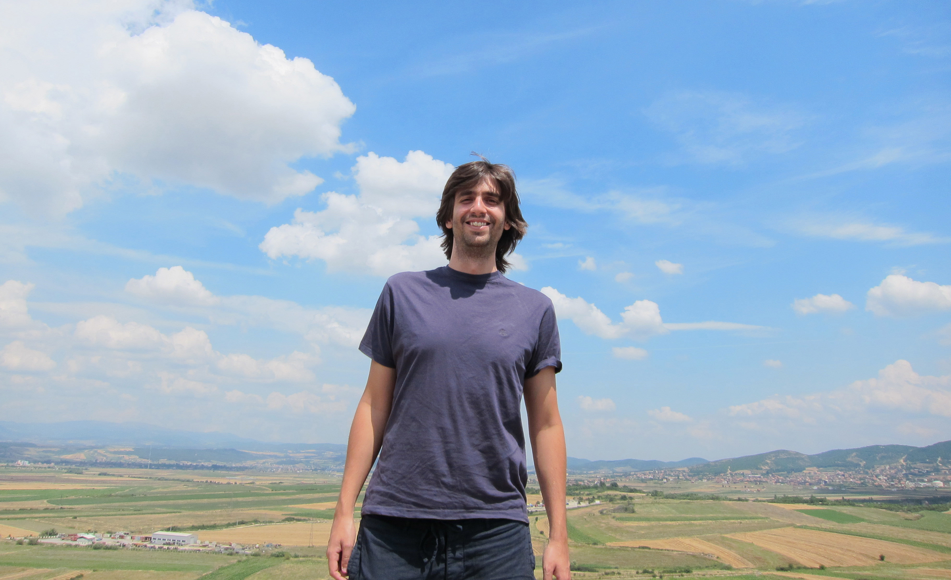 El poeta Fernando Valverde